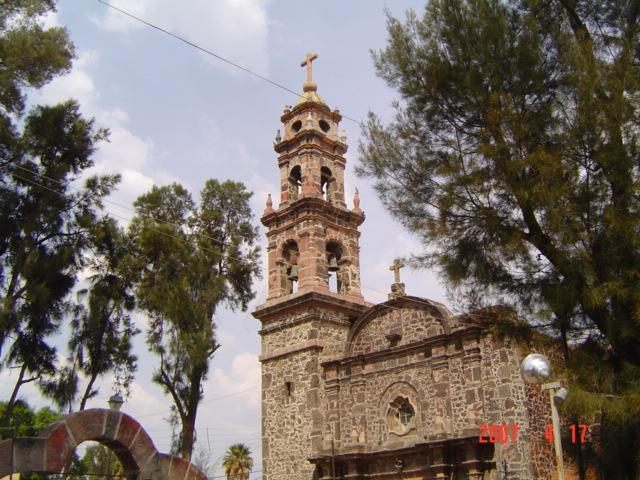 Fachada de la Iglesia Católica de San Pedro Atzompa